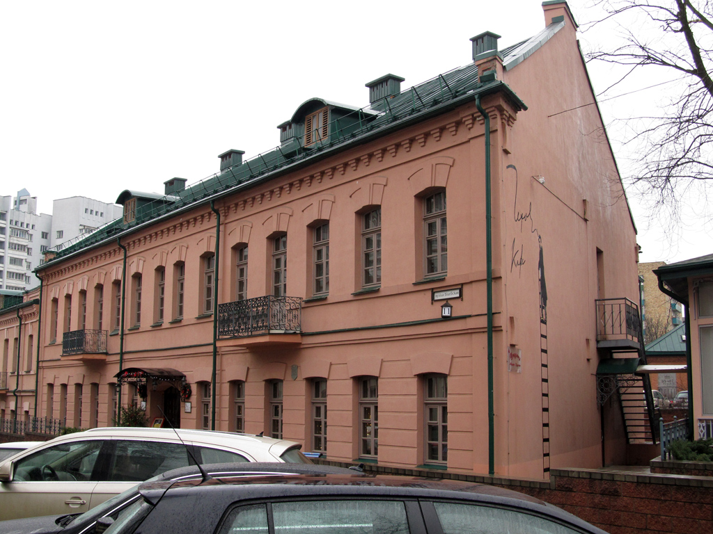 Мінск. Вуліца Віцебская, 11